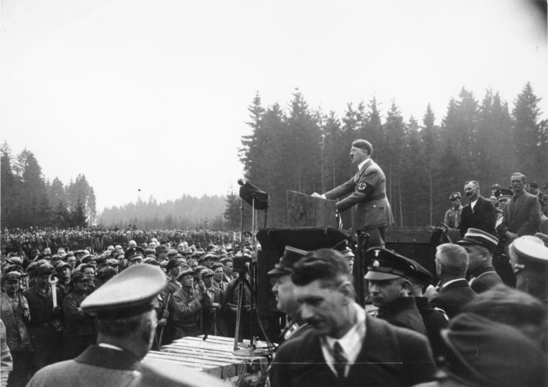 Der Führer leitete die neue deutsche Arbeitsschlacht ein. Die Baustelle der Reichsautobahn in Unterhachingen bei München war am 21. März der Schauplatz der historischen Stunde, in der Adolf Hitler, umgeben von seinen Mitkämpfern die zweite Arbeitsschlacht, die Deutschland im Dritten Reich schlagen will, einleitete. In einer grossen tiefangelegten und von höchstem Idealismus sowie von praktischem Verständnis zeugende Rede zeigte der Führer die Ziele des neuen Kampfes und rief das deutsche Volk zu unentwegtem neuen Streiten gegen die Arbeitslosigkeit auf. Die Rede wurde während einer einstündigen allgemeinen Arbeitsruhe in Deutschland in sämtliche Betriebe und auf die öffentlichen Plätze der deutschen Städte und Ortschaften übertragen. UBz: den Führer während seiner großen Rede. Photo: Scherl Bilderdienst Berlin